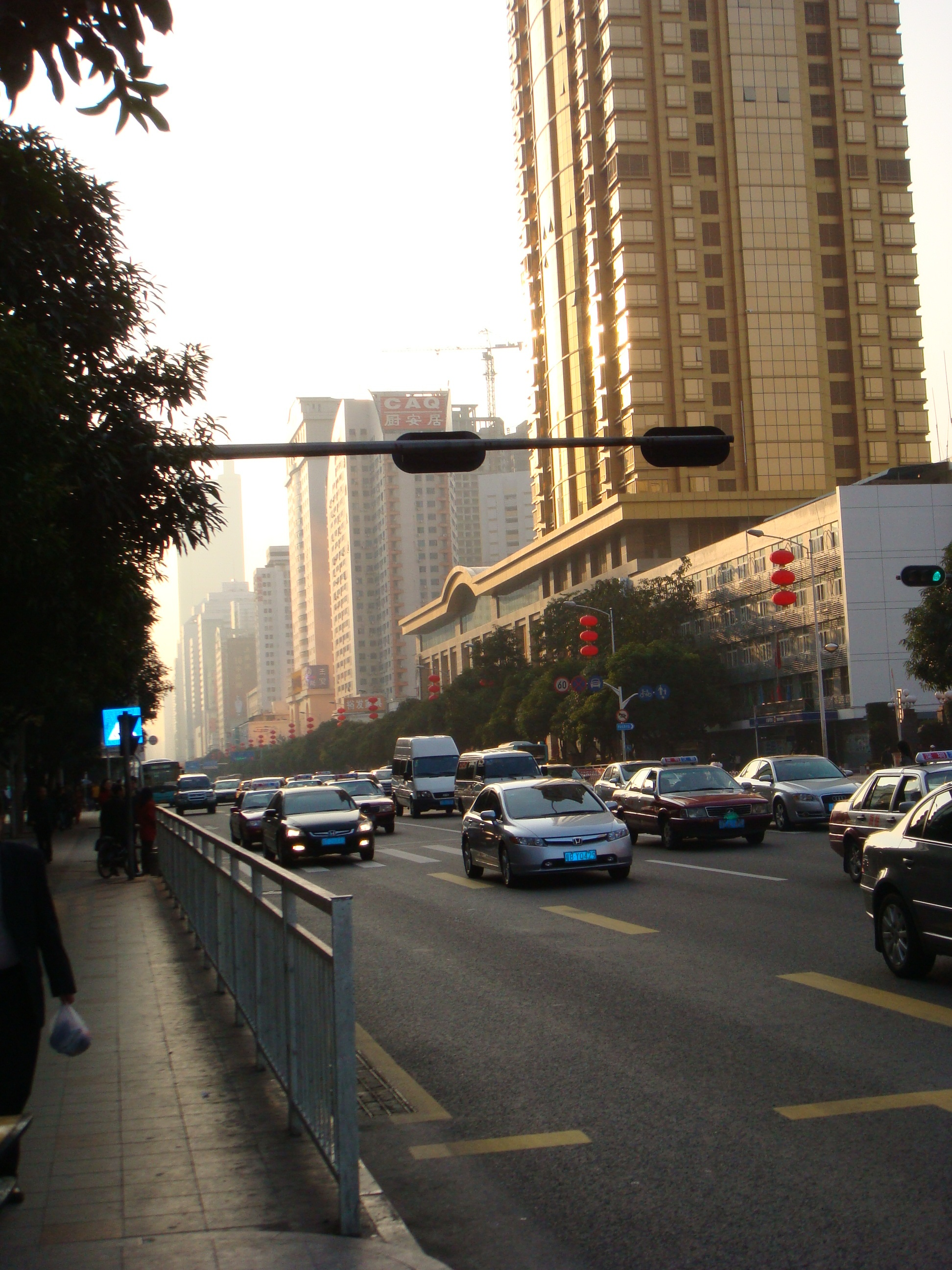 深南東路